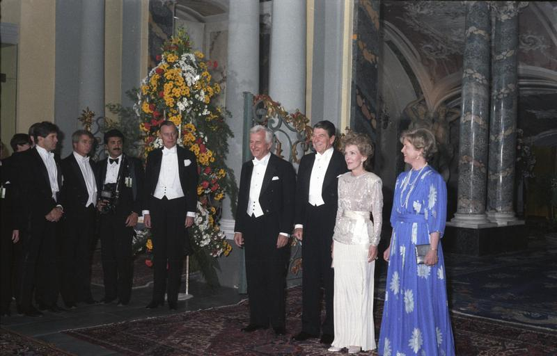 Staatsbesuch: Präsident Ronald Reagan USA 1.5. - 6.5.1985 in Deutschland. 2 Präsidentenpaare in Gala